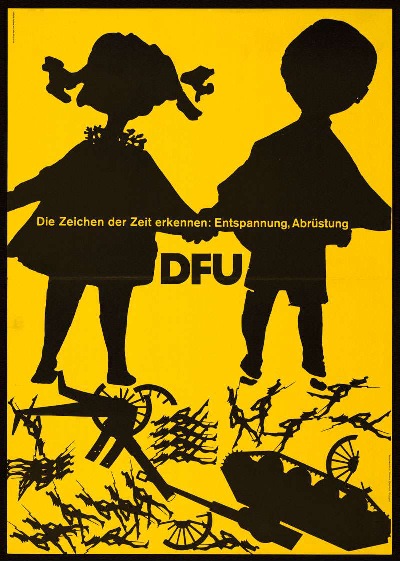 Plakat der Deutschen Friedens-Union zur Landtagswahl in Baden-Württemberg 1964